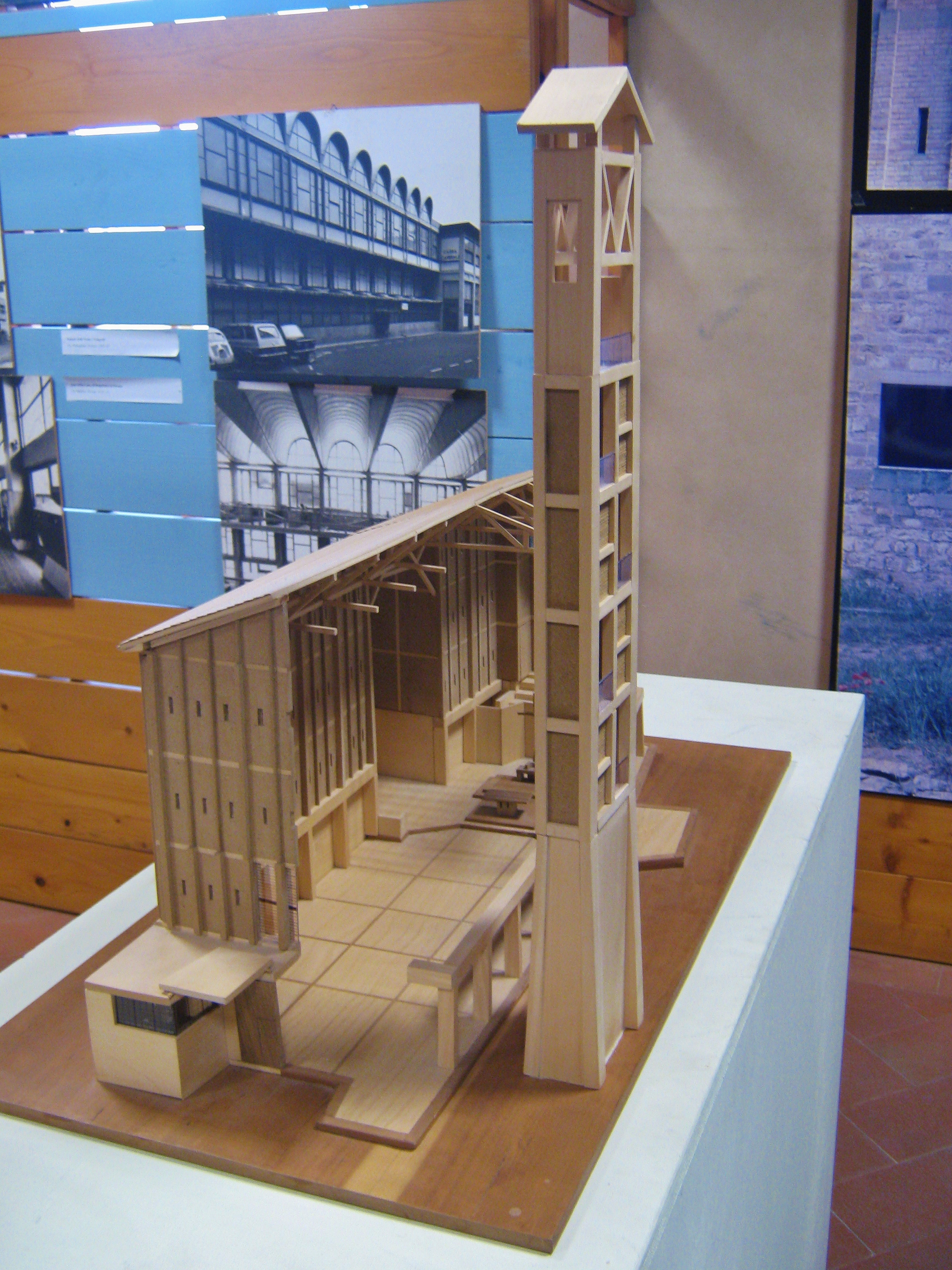 Pistoria, Museo Civico (Palazzo Comunale): modello della chiesa delle Ss. Maria e Tecla, in Pistoia.